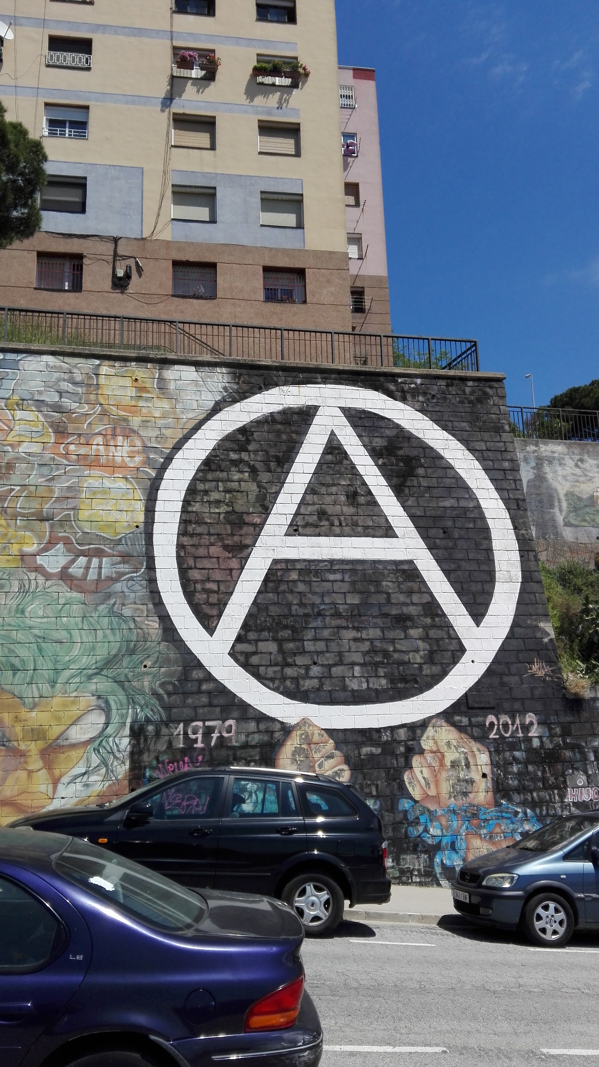 Lletra A encerclada al barri de Can Franquesa de Santa Coloma de Gramanet. Pintada històrica restaurada.